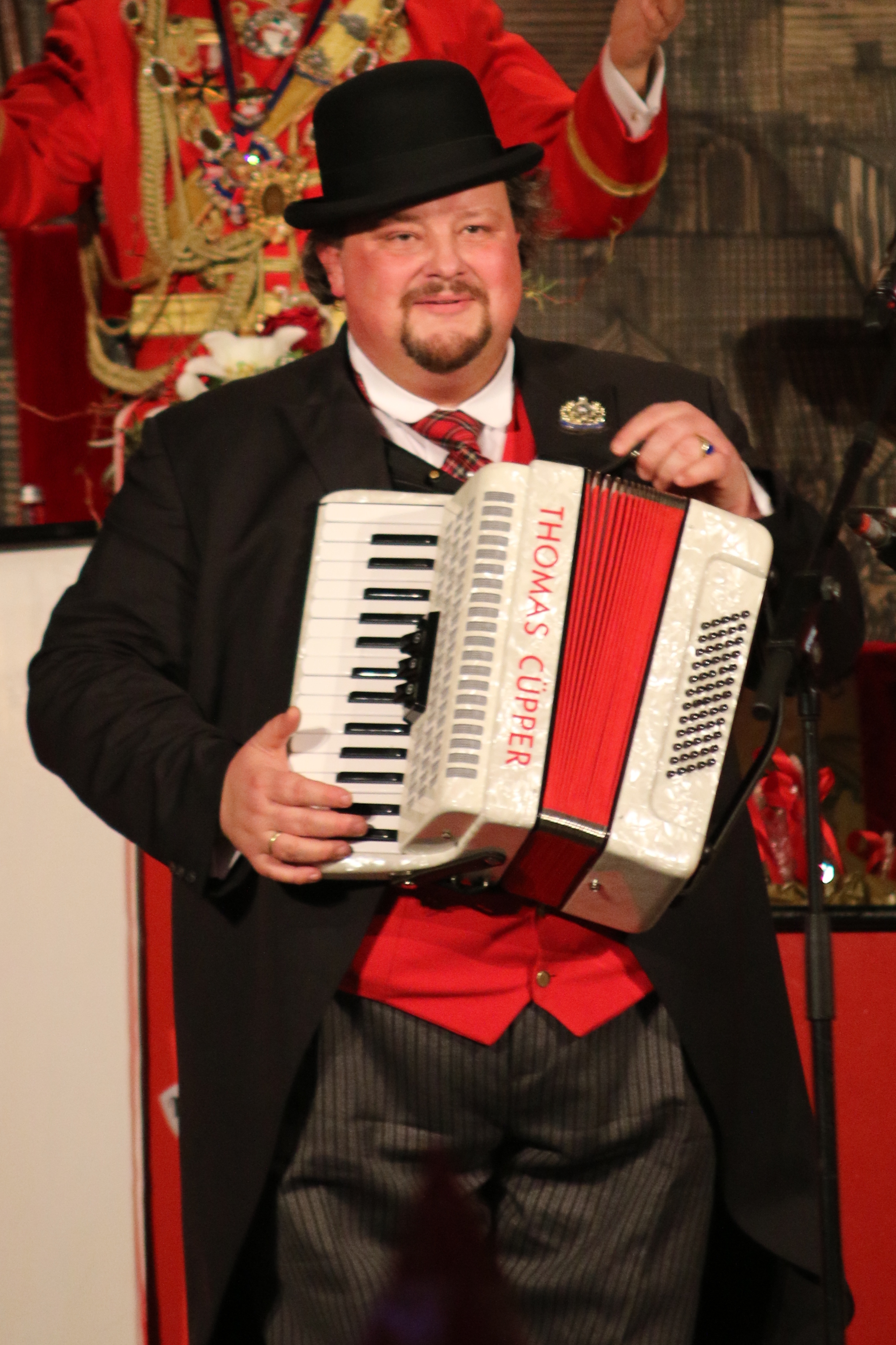 Kölner Husaren-Korps Prunksitzung 2014: Auftritt von Thomas Cüpper